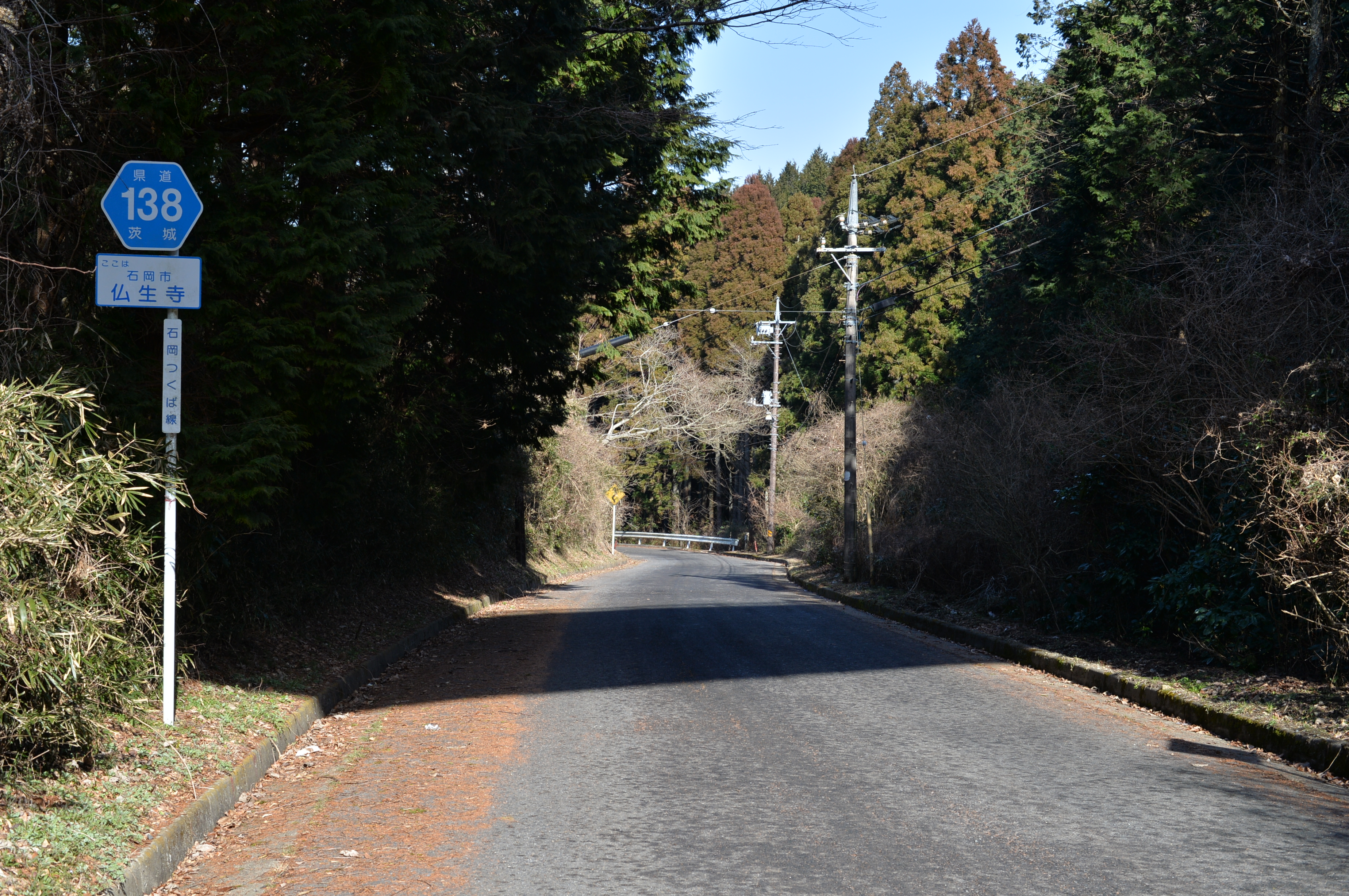 茨城県道138号石岡つくば線（石岡市仏生寺）